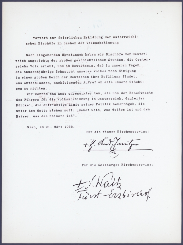 "Vorwort zur feierlichen Erklärung" (Bekennerschreiben) von Kardinal Innitzer im Namen der katholischen Erzbischöfe Österreichs an die Gauleitung: Hinweis auf das Bekennerschreiben der katholischen Bischöfe Österreichs zum "Deutschen Reich" im Vorfeld der Volksabstimmung am 10. April 1938.